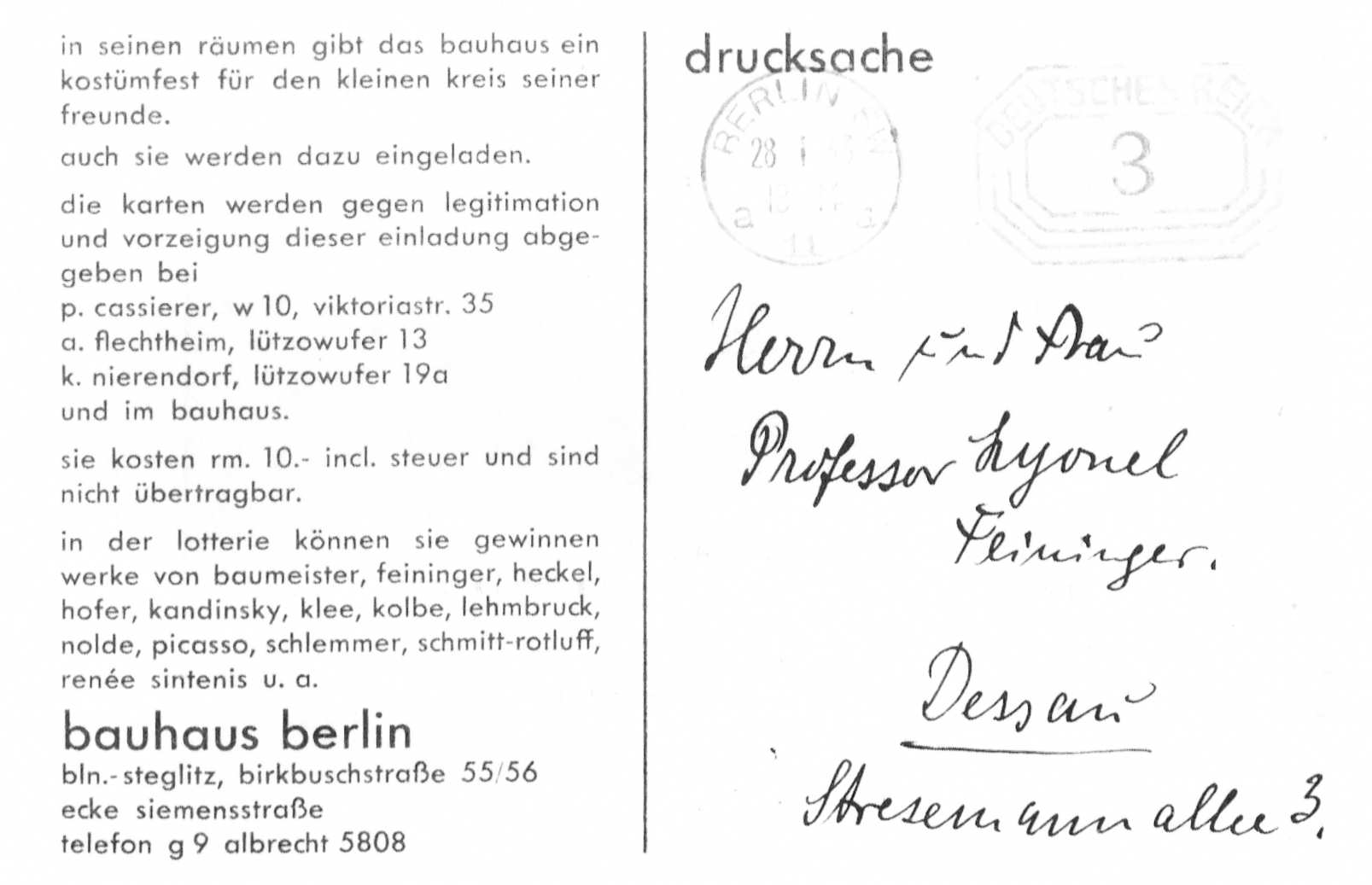 Bauhaus Berlin Kostümfest 18. Februar 1933 Einladung